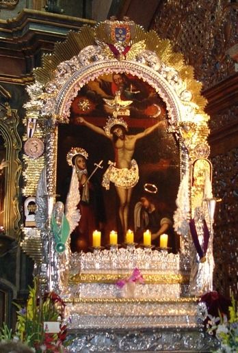 Anda del Señor de los Milagros en su santuario